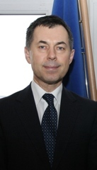 Gustav Slamečka (2010)